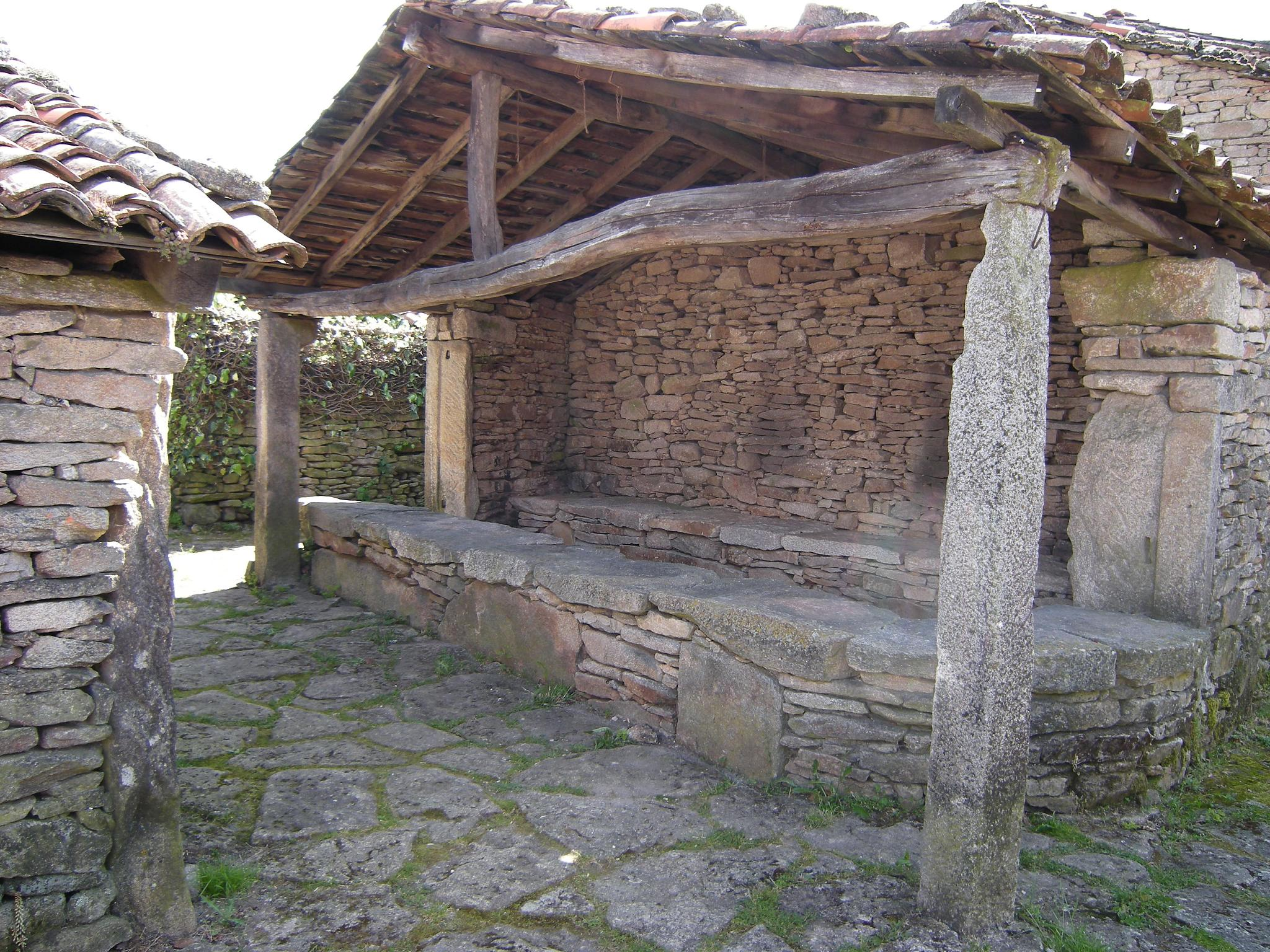 Pendellos de Agolada